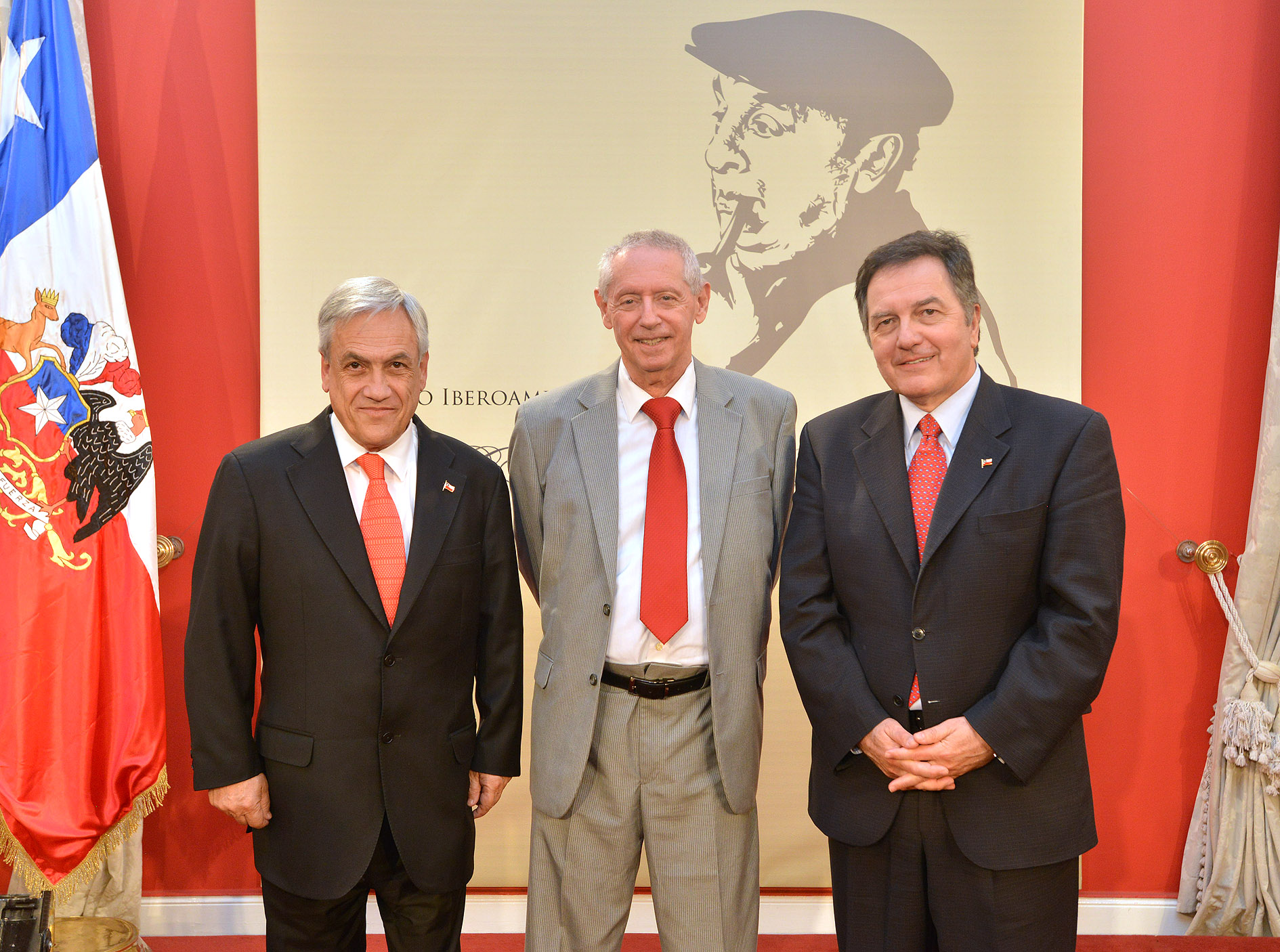 José Kozer recibe el Premio Iberoamericano de Poesía Pablo Neruda 2013.